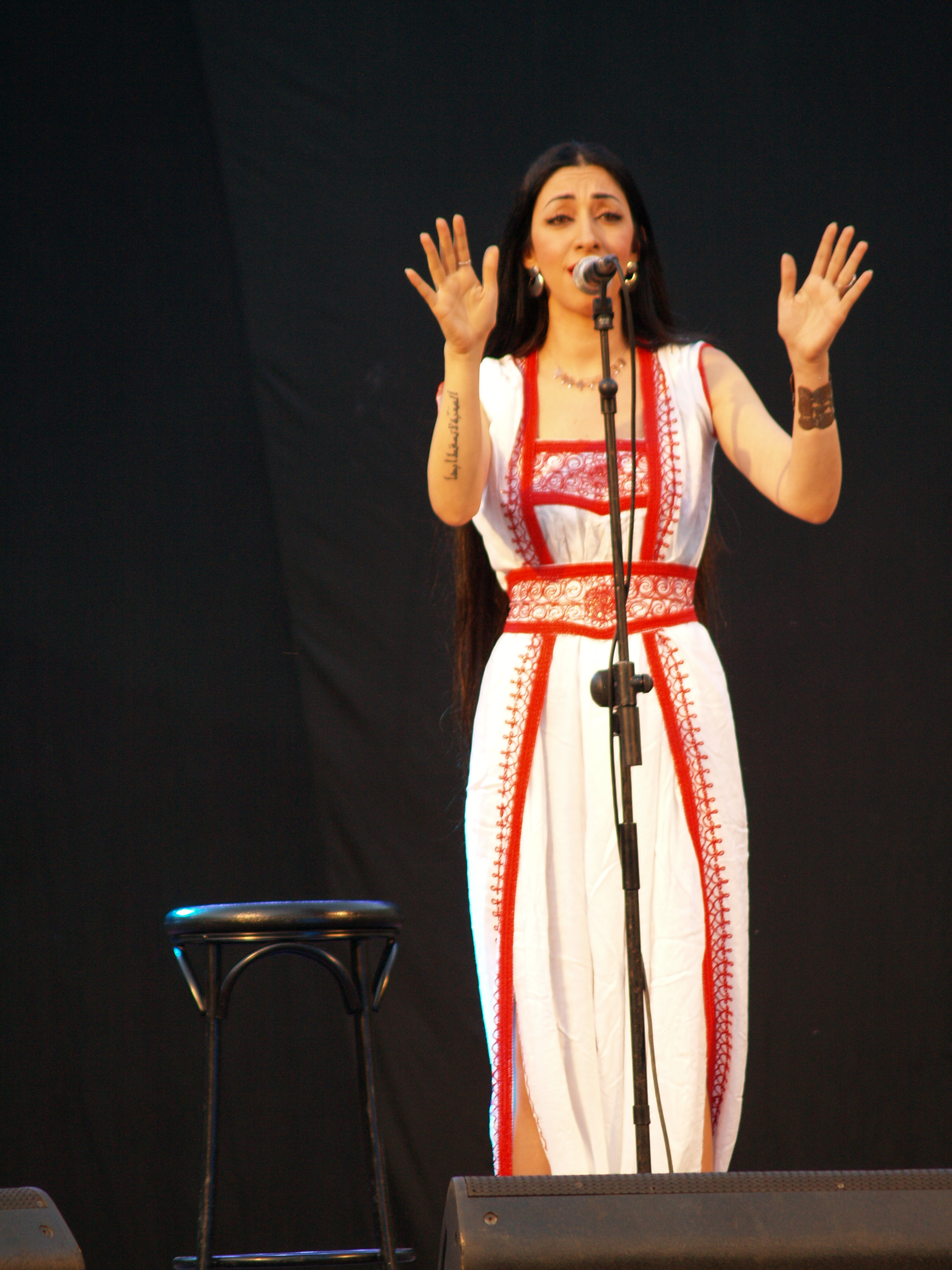 Concierto en Murcia mayo 2019, Festival de las Tres Culturas